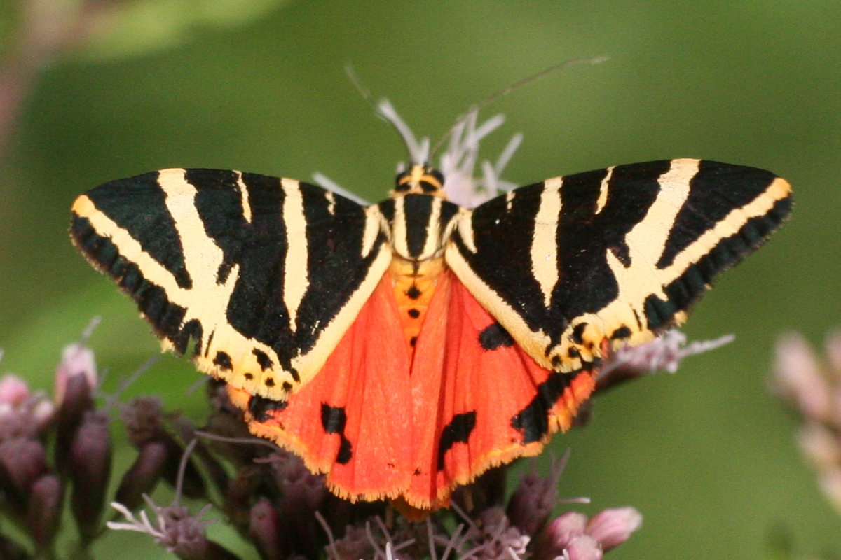 Russischer Bär (Euplagia quadripunctaria), fotografiert in Lehrensteinsfeld